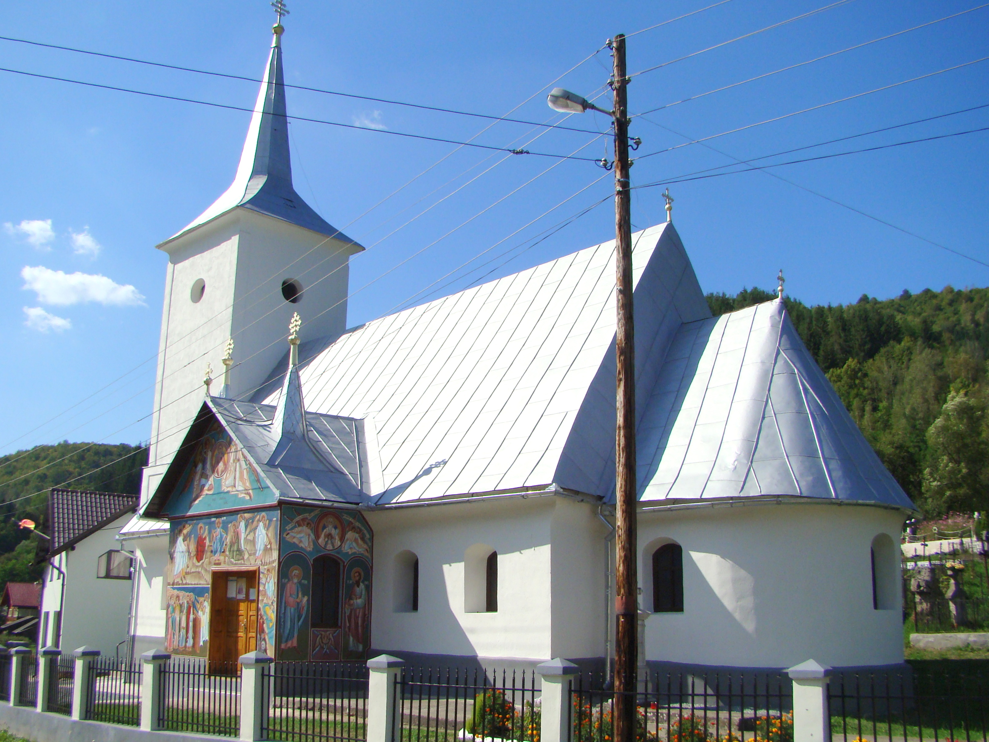 Biserica „Sf. Arhangheli”, sat Vidra; comuna Vidra